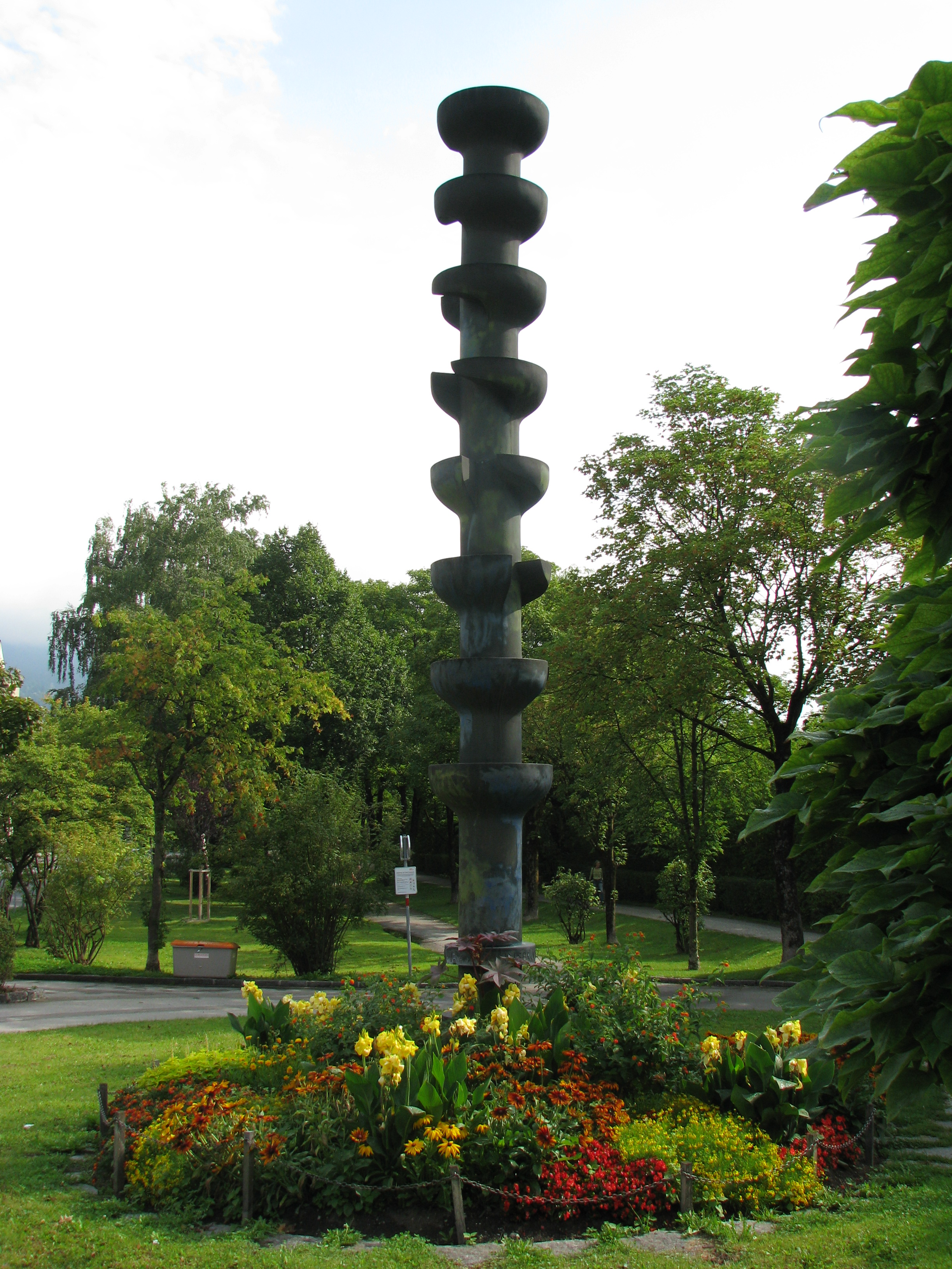 Bronzeplastik am nördlichen Brückenkopf der Freiburger Brücke in Innsbruck von Heinrich Tilly, 1984. Inschrift "DIE STADT INNSBRUCK DER STADT FREIBURG I. BR."